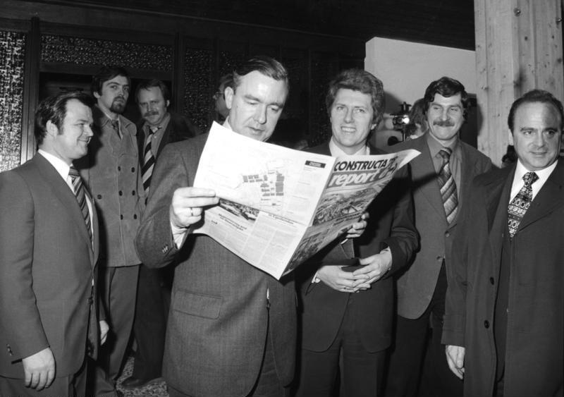 Bundesminister für Raumordnung, Bauwesen und Städtebau, Dr. Dieter Haack besucht die Constructa 1978 in Hannover. Der Bundesminister beim Rundgang